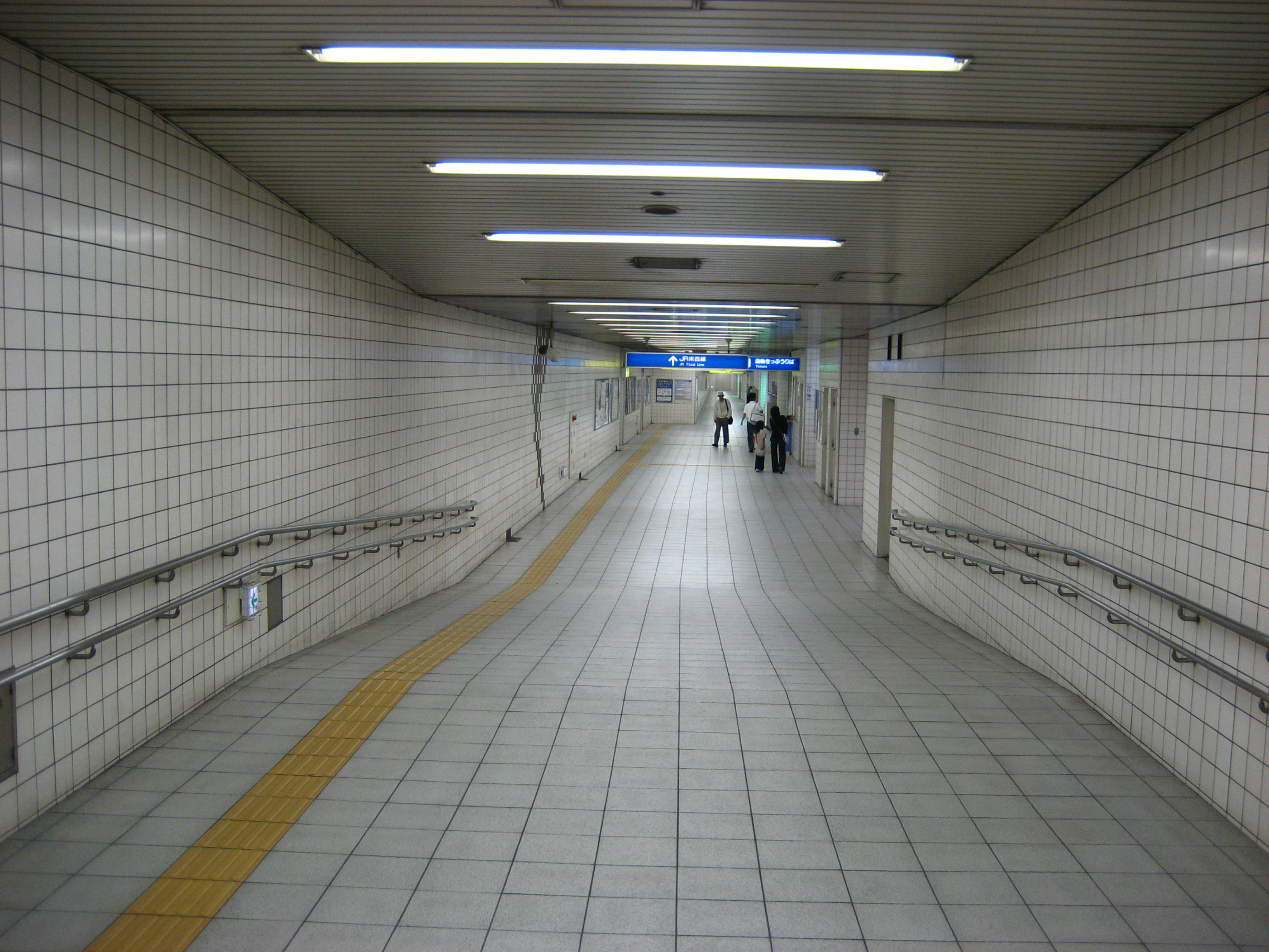 JR Mitejima Sta.